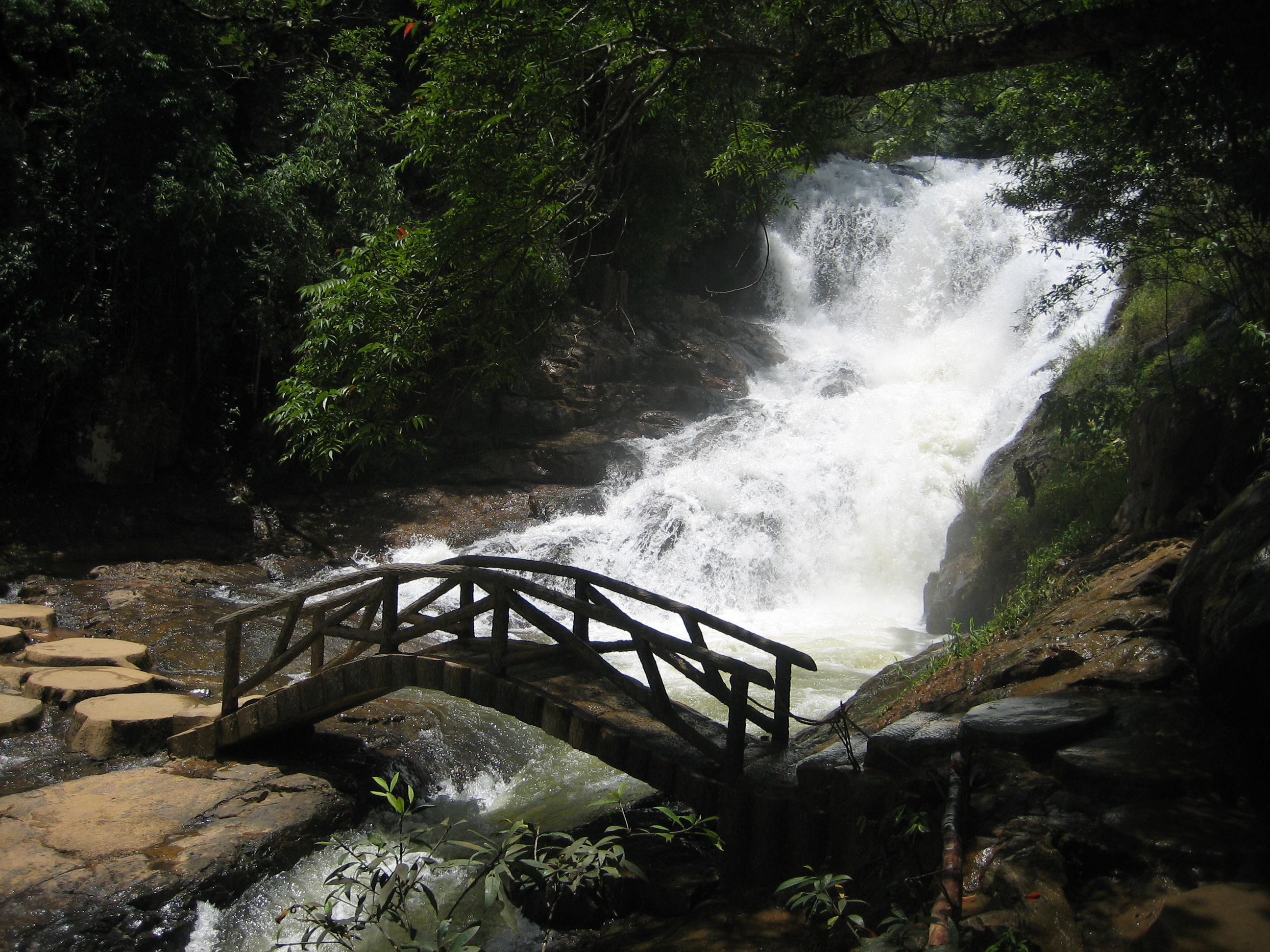 Datanla Waterfall.